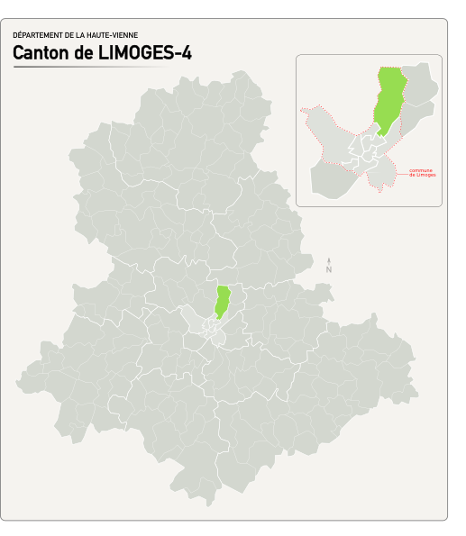 Carte du nouveau canton de Limoges-4.